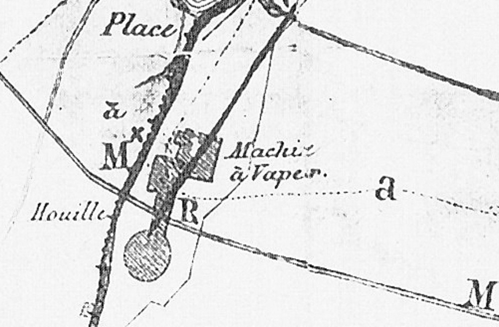 Plan de masse du puits Saint-Louis (houillères de Ronchamp)